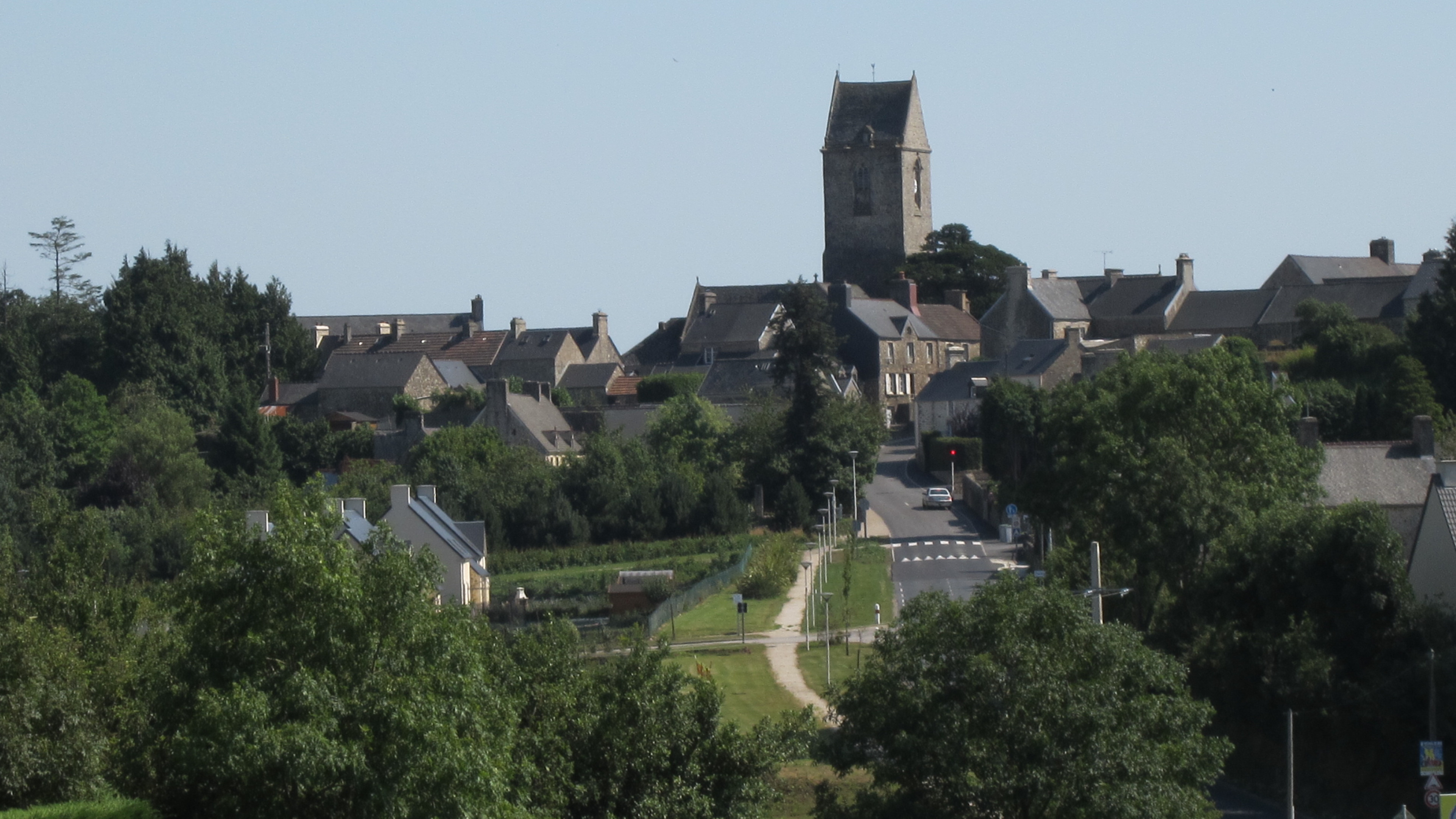 Brix, Manche